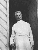 Norbert František Hrachovský (1879 - 1943), Český římskokatolický duchovní.